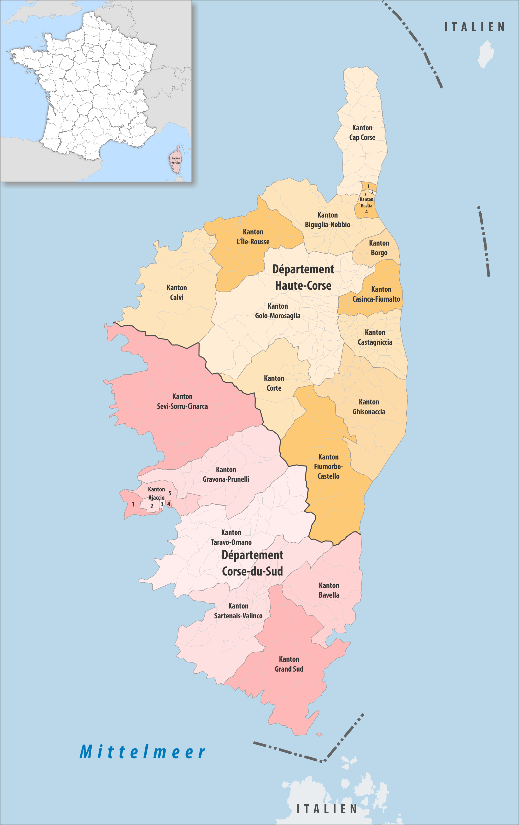 Gemeinden, Kantone und Departemente in der Region Korsika